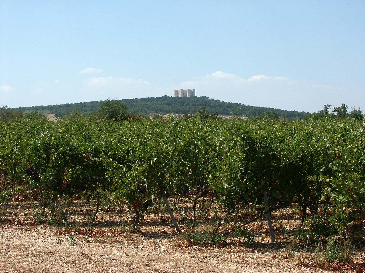 Castel del Monte von weitem.